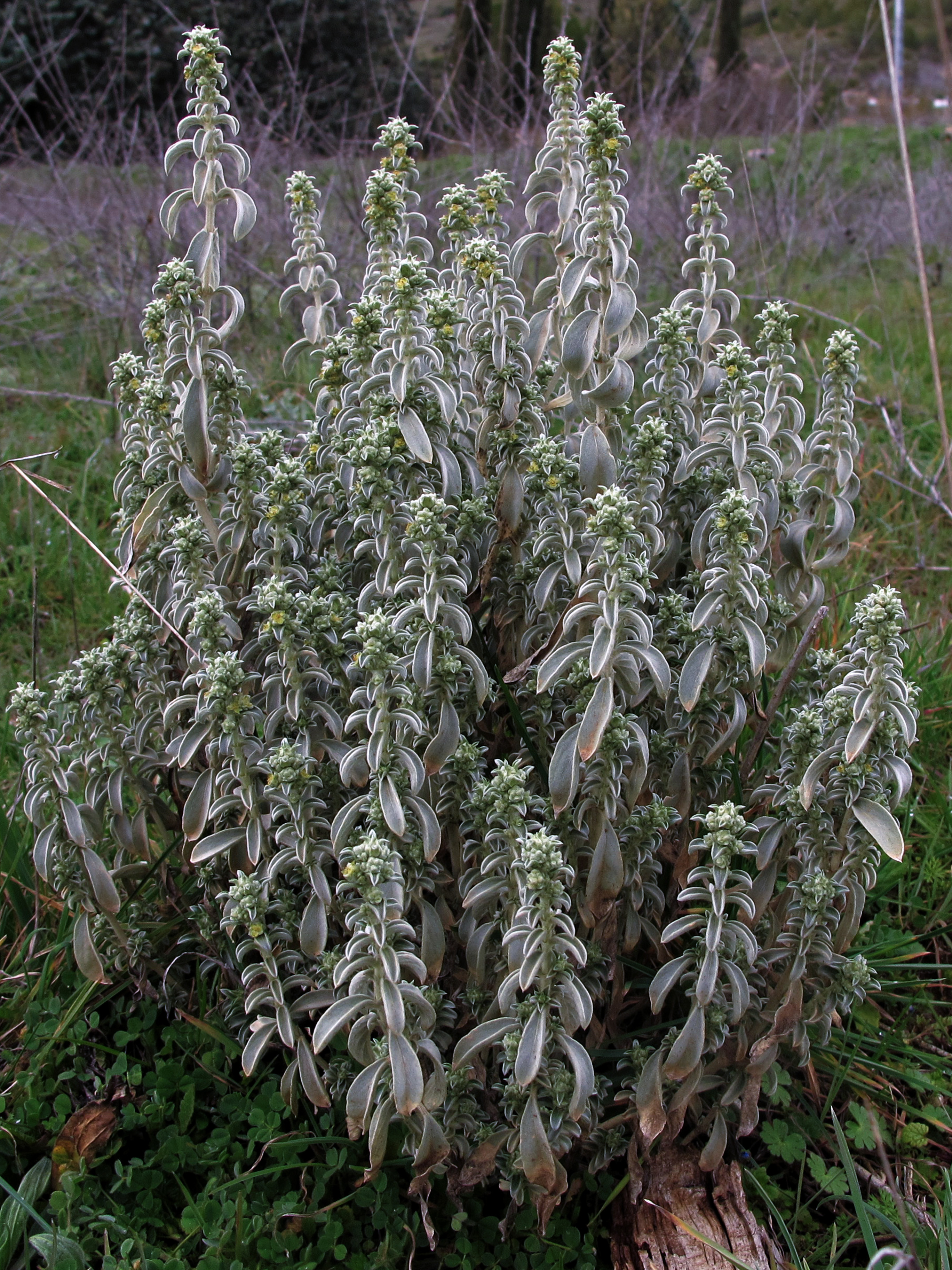 Mercurialis tomentosa, Madrid, España